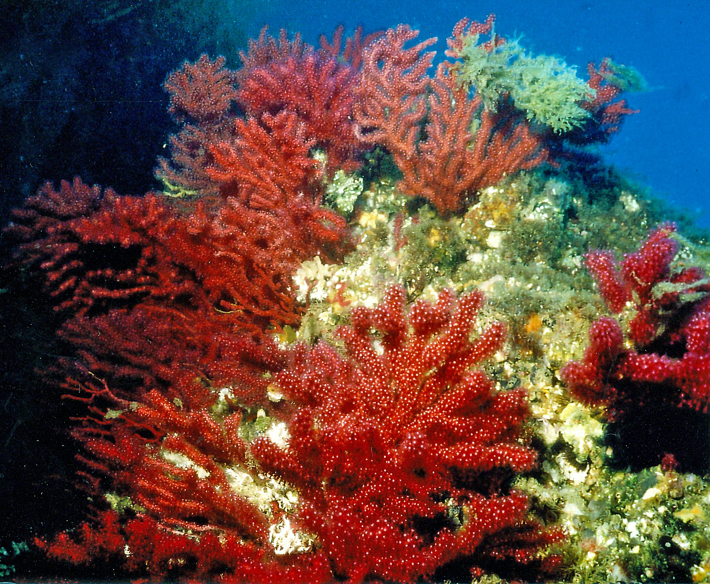 Paramuricea clavata (Risso, 1826) - Banyuls-sur-Mer, Sec de Rédéris : 07/95